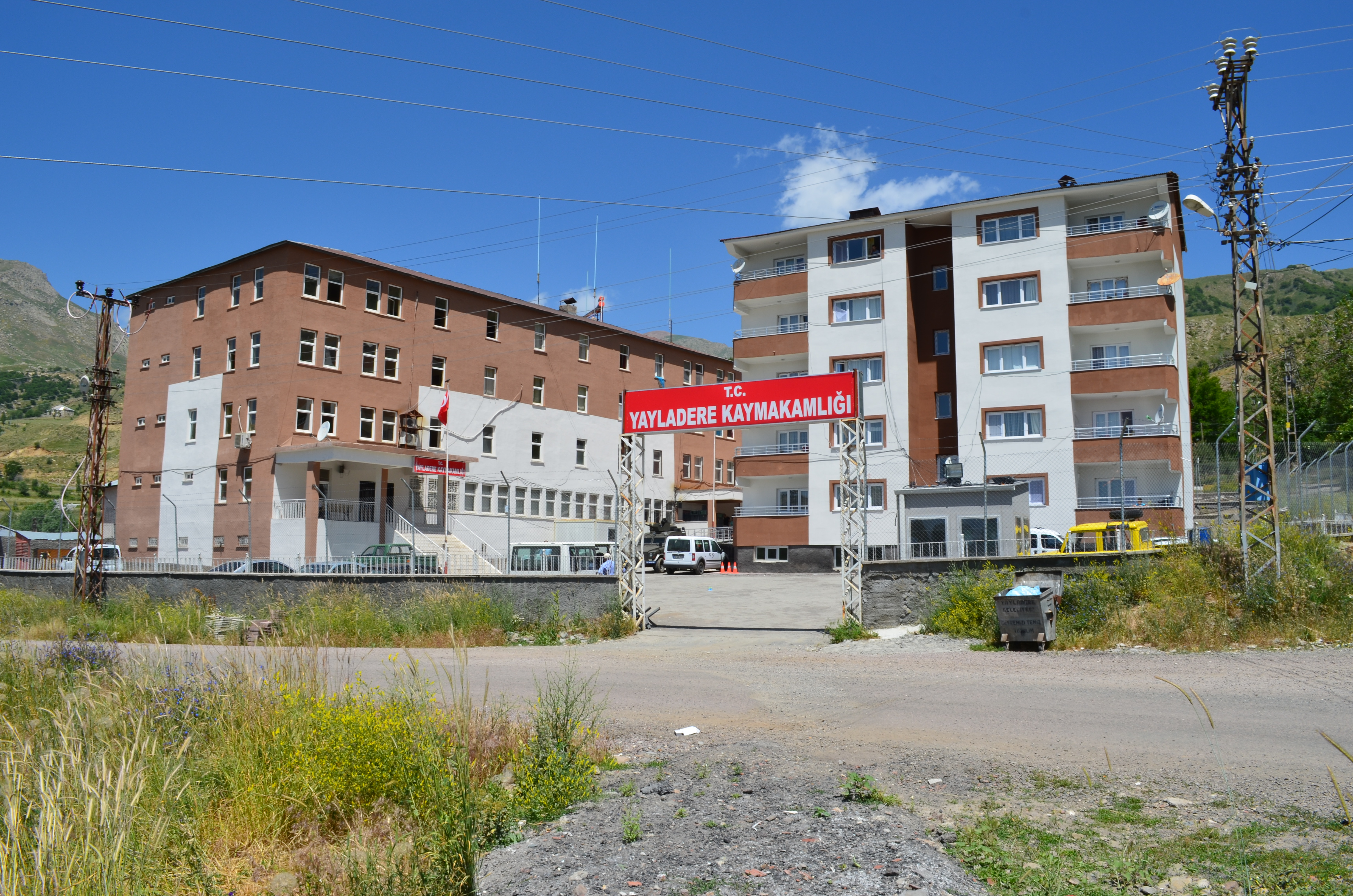 Sitz des Kaymakams in Yayladere